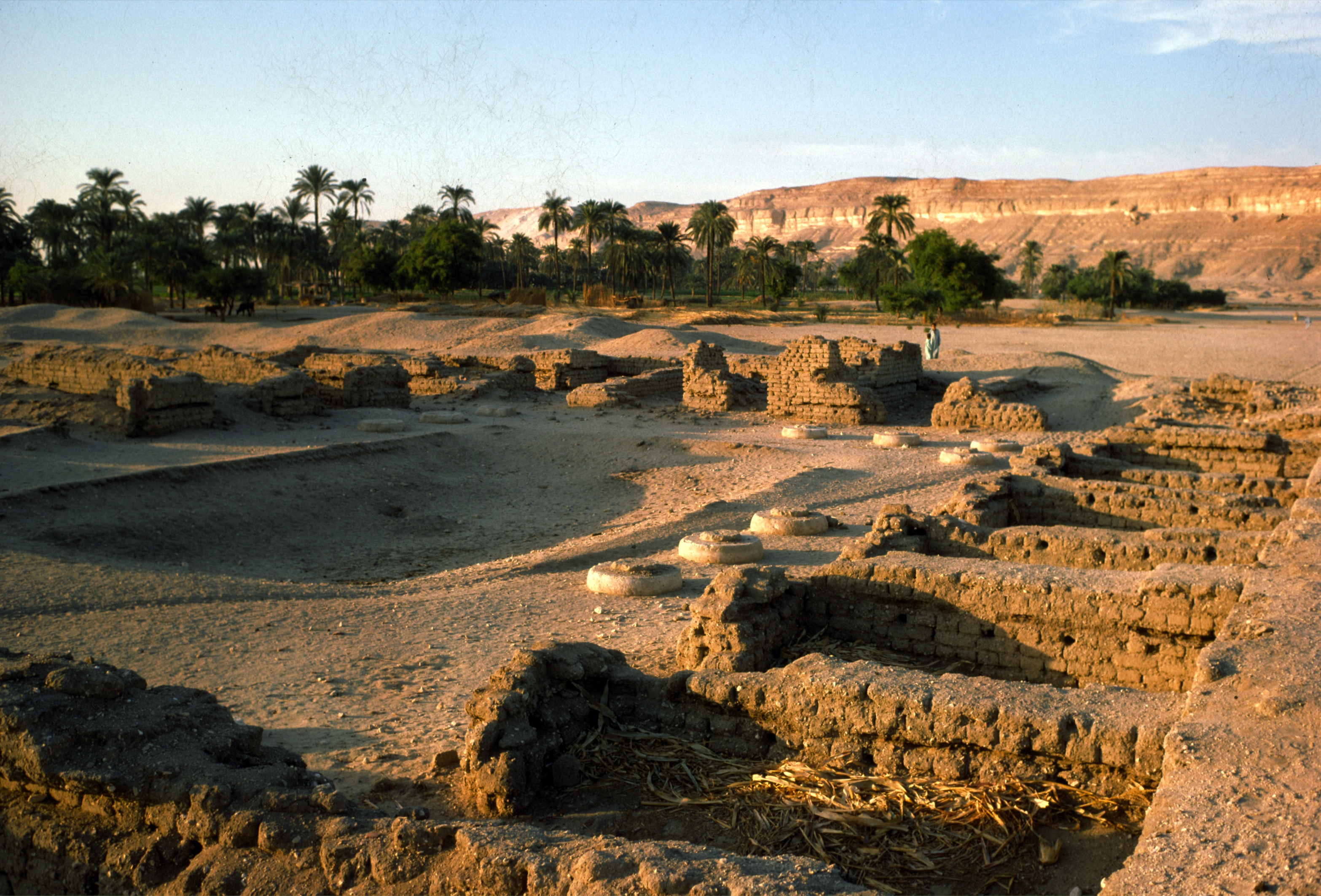 Königlicher Palast im Norden Amarnas, Ägypten, 18. Dynastie, um 1350 v. Chr.